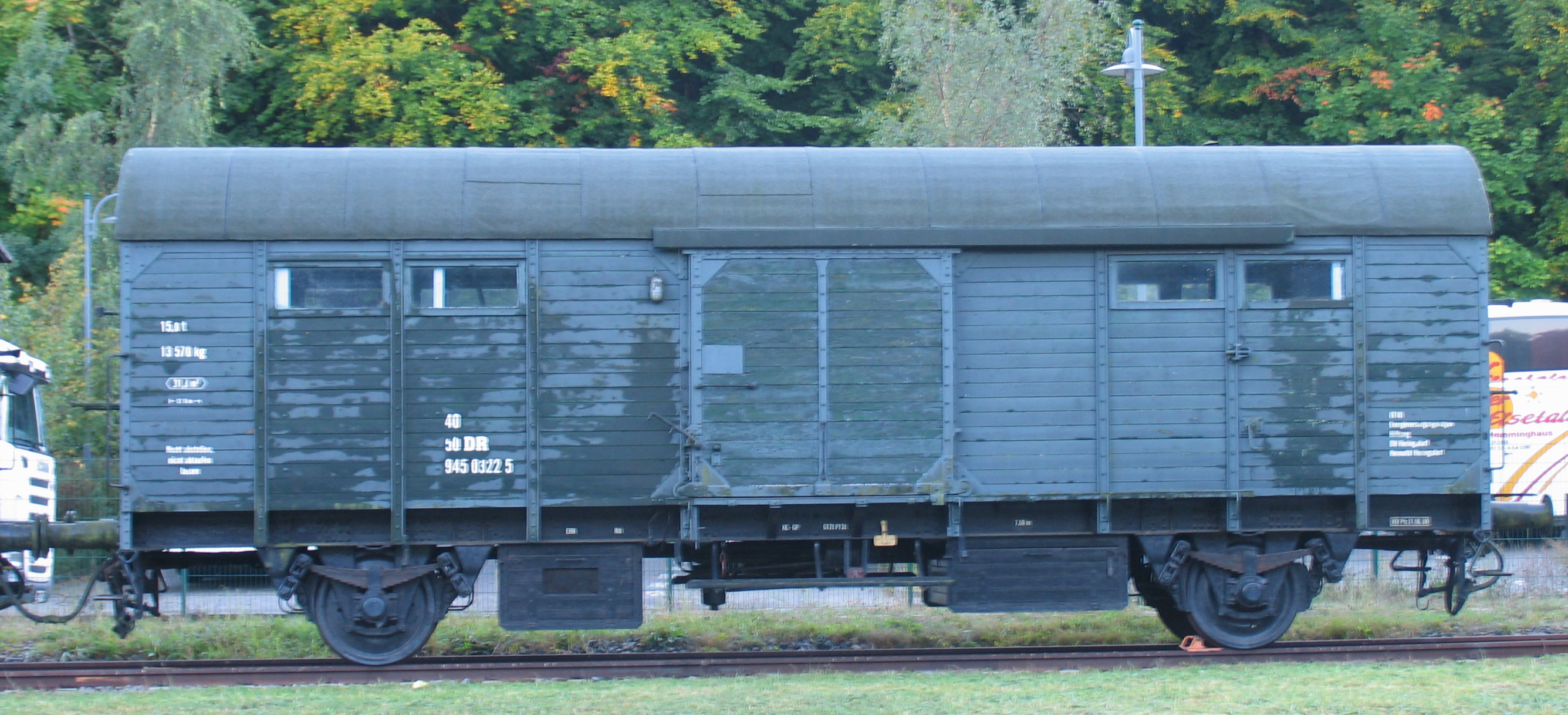 Bahndienstwagen der DR, umgebaut aus einem großräumigen gedeckten Güterwagen der Verbandsbauart (Gattung Gl Dresden) mit neuem Dach, Fenstern statt der Lade- und Lüftungsklappen, Rollenlagern, Doppelschaken und KE-GP Bremse